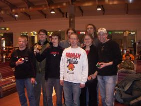 A 2007-es magyar válogatott hazatérve a brüsszeli nyílt Rubik-bajnokságról